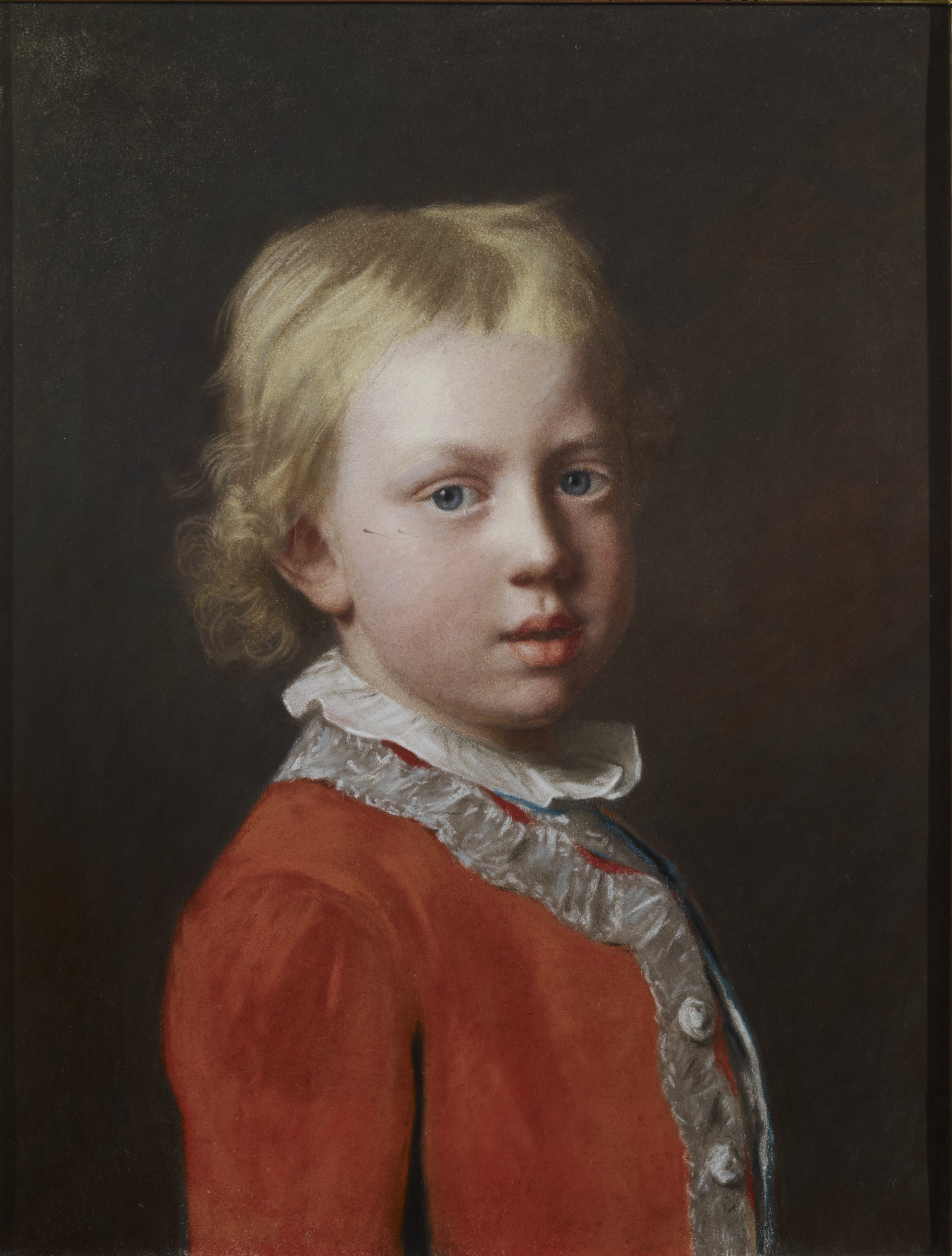 Friedrich Wilhelm, Prinz von Großbritannien (1750-1765); jüngster Bruder Georgs III.